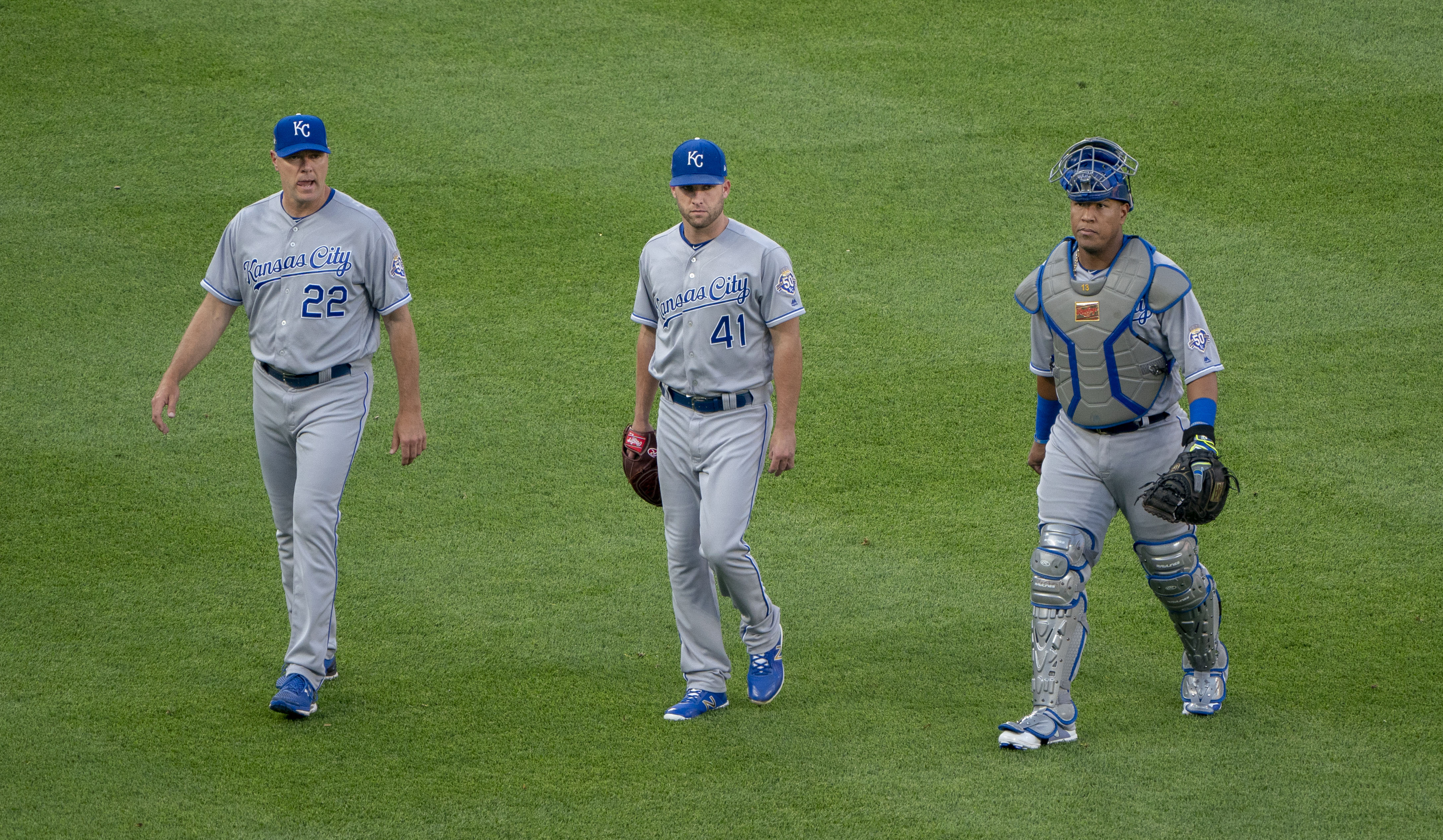 Royals at Orioles 5/8/18